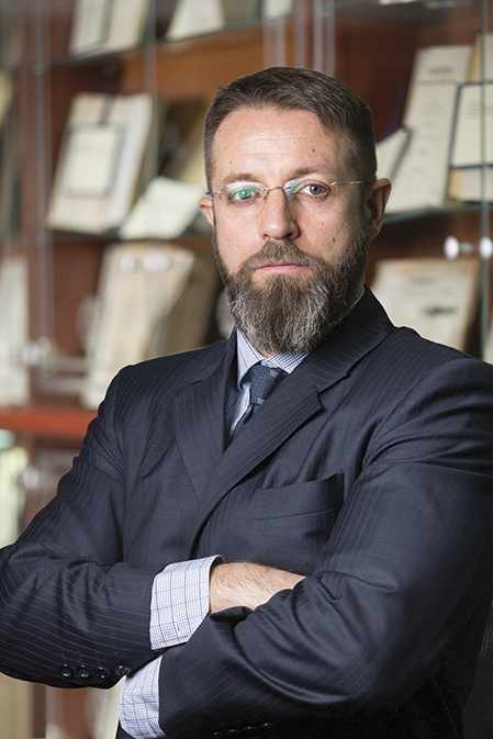 Проф. др Бранислав Ристивојевић